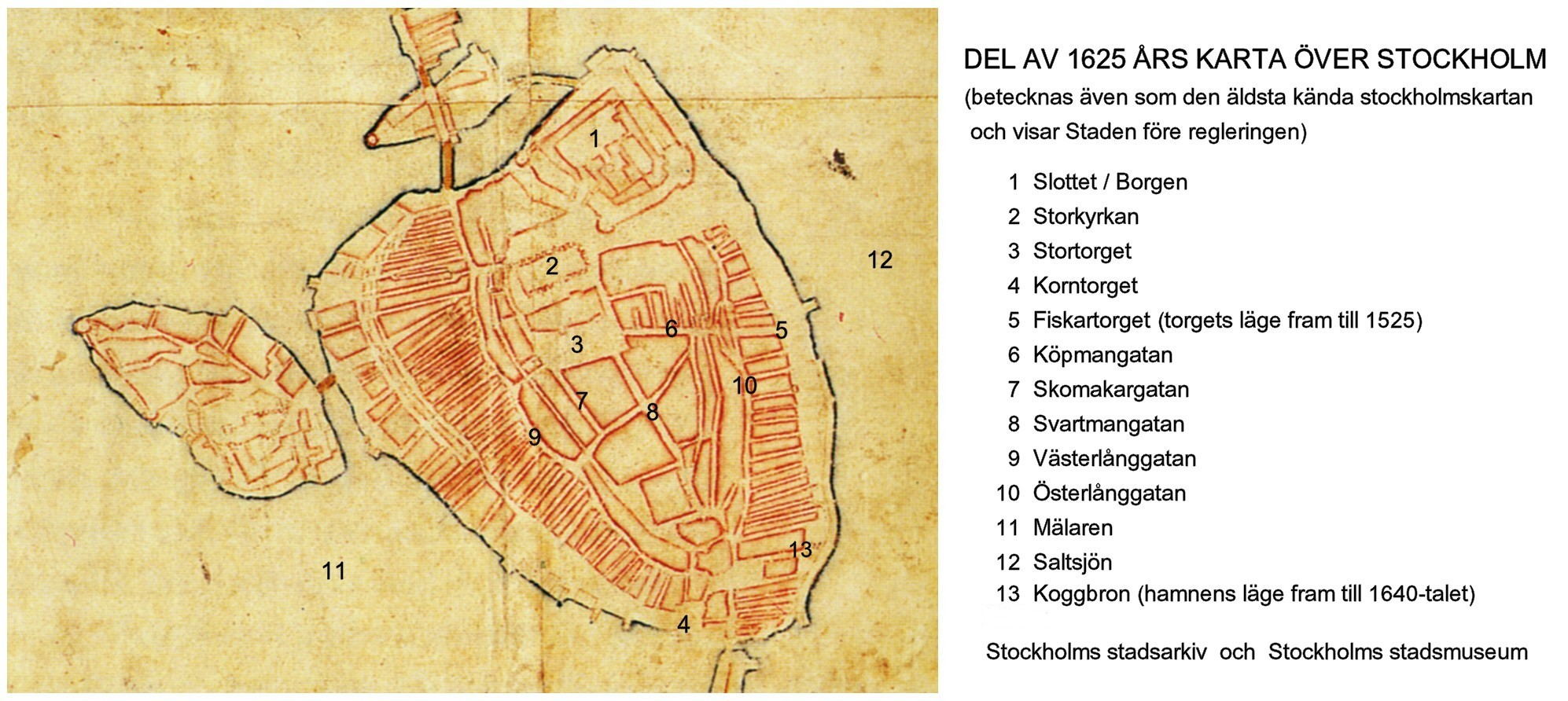 Del av Stockholms äldsta kända karta visar Staden före 1600-talets regleringsarbeten. Del av större karta och kompl. med text av --Holger.Ellgaard (talk) 17:33, 25 March 2010 (UTC)